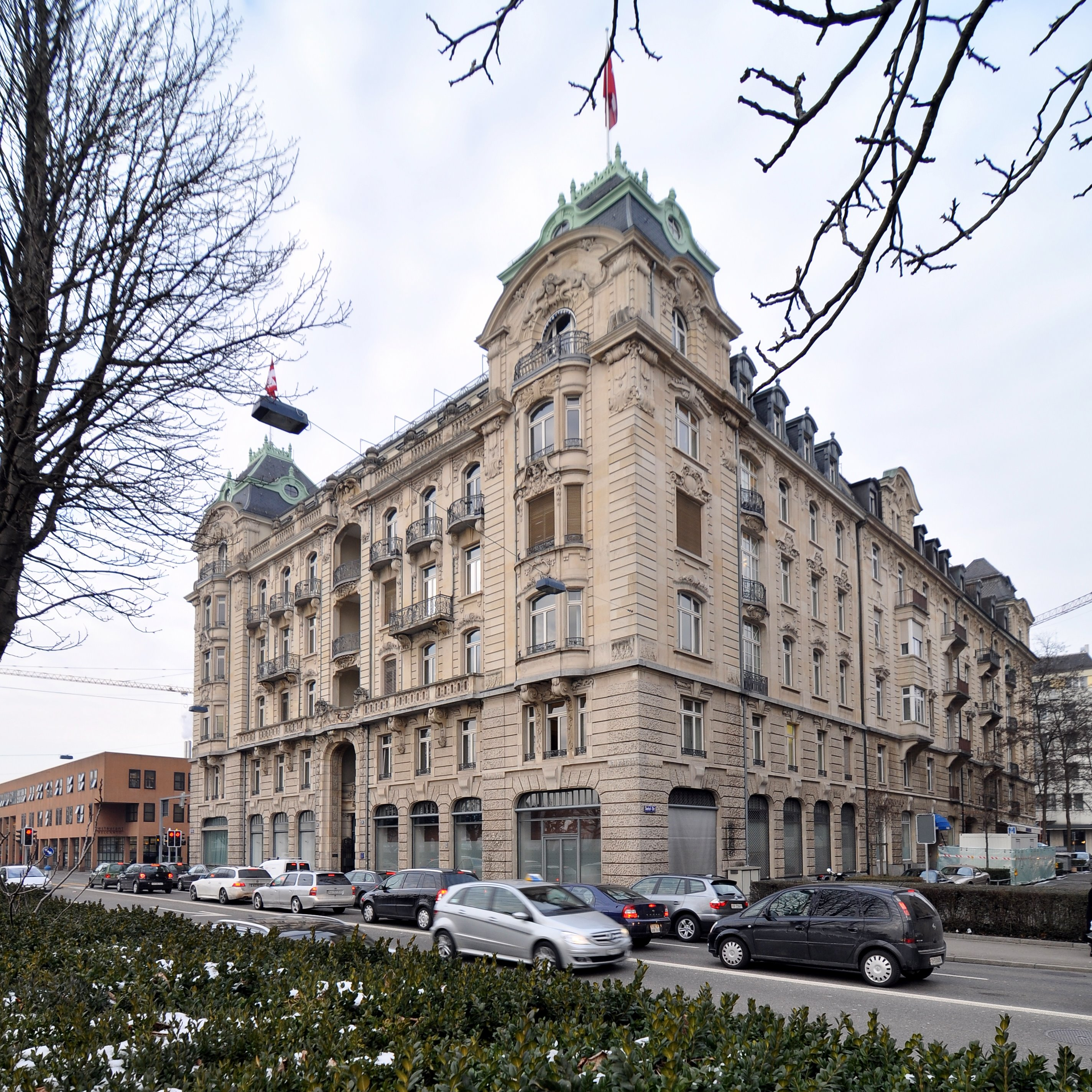 Utoschloss, Utoquai Zürich. Baubewilligung 1898 Architekten: Pfleghard und Haefeli